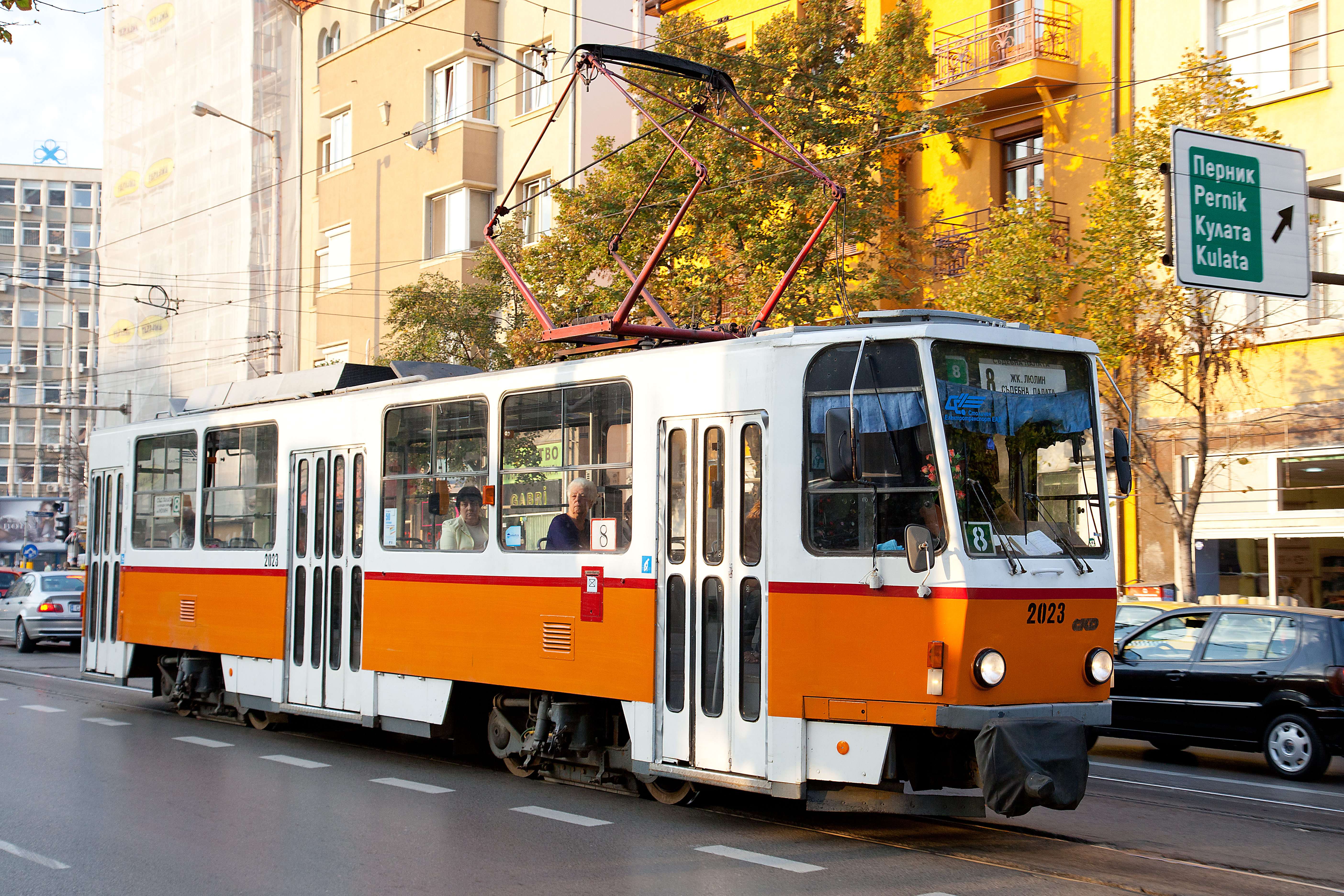 Straßenbahn in Sofia